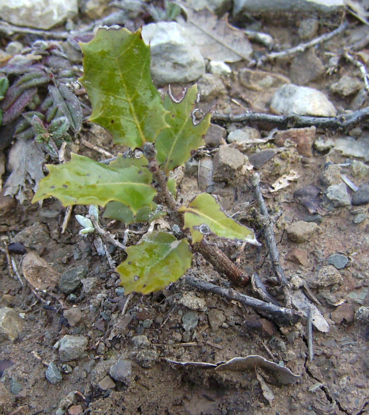 Plàntula d'alzina de Castelltallat, Bages